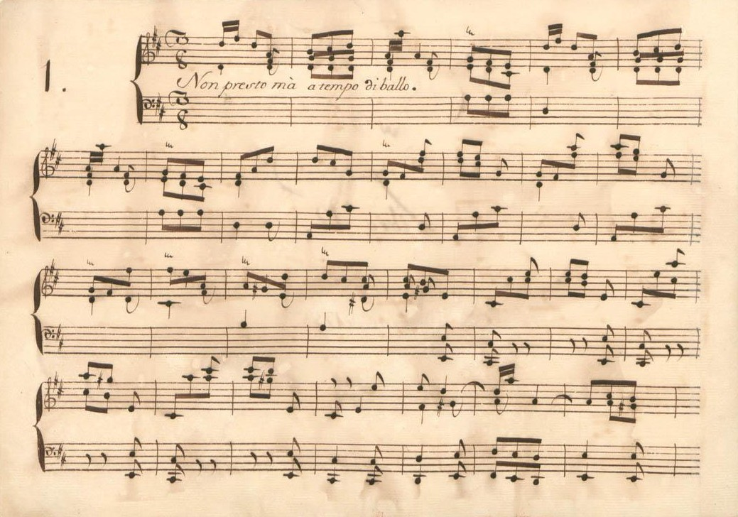 La sonate K. 430, telle qu'elle se présente dans le manuscrit de Parme, volume XII no. 1.